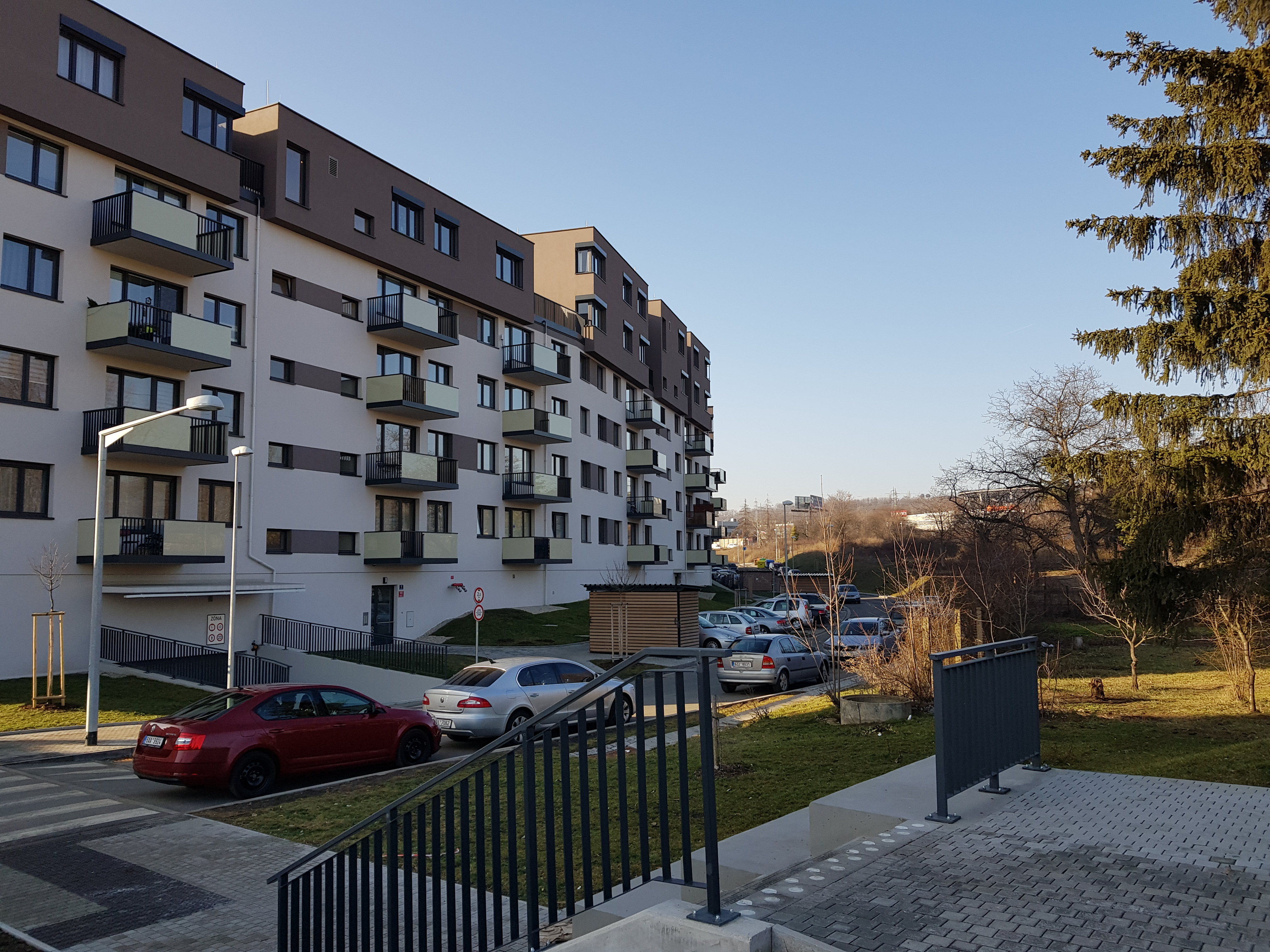 Praha 9 - Hloubětín, ulice Granitova, pohled od jihu (zdola)